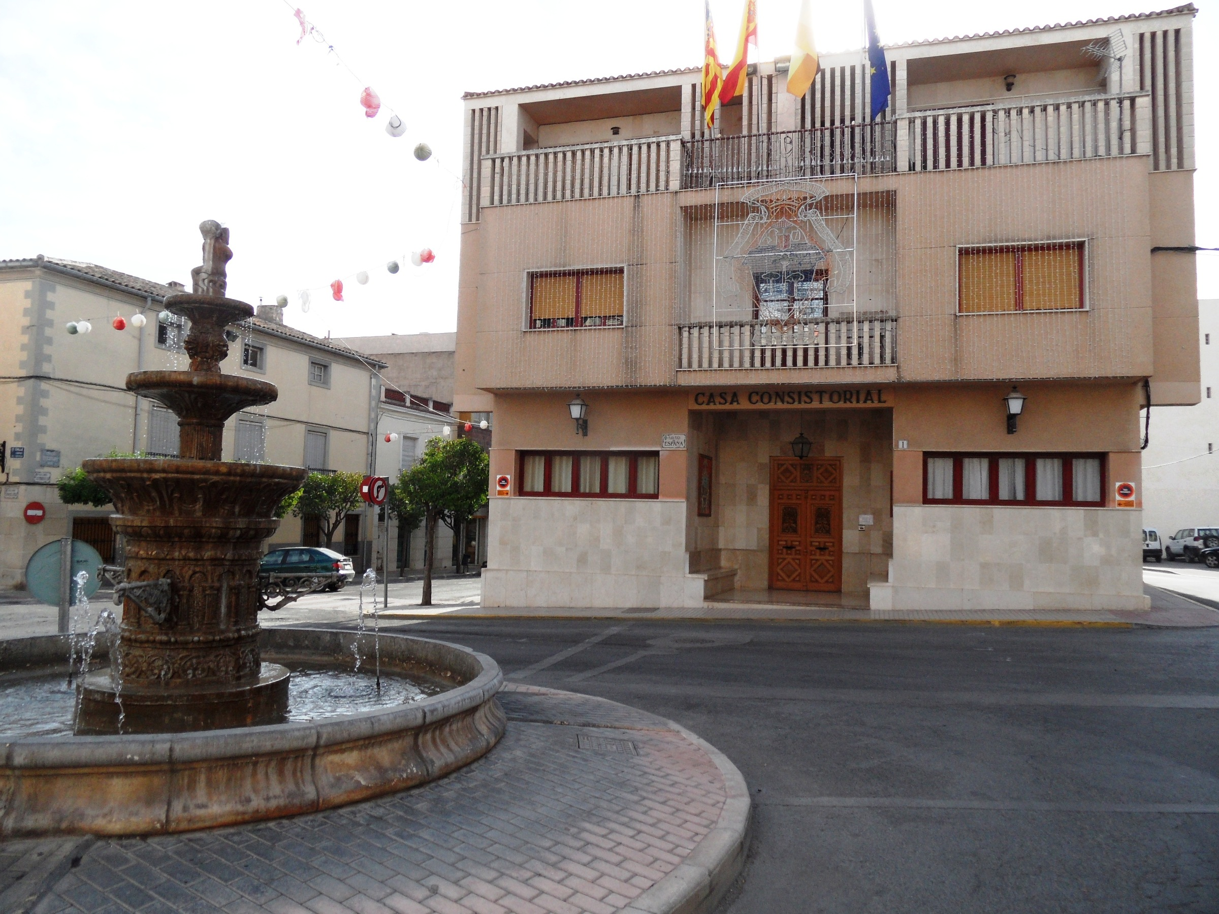 Ajuntament del Pinós i font de la plaça.